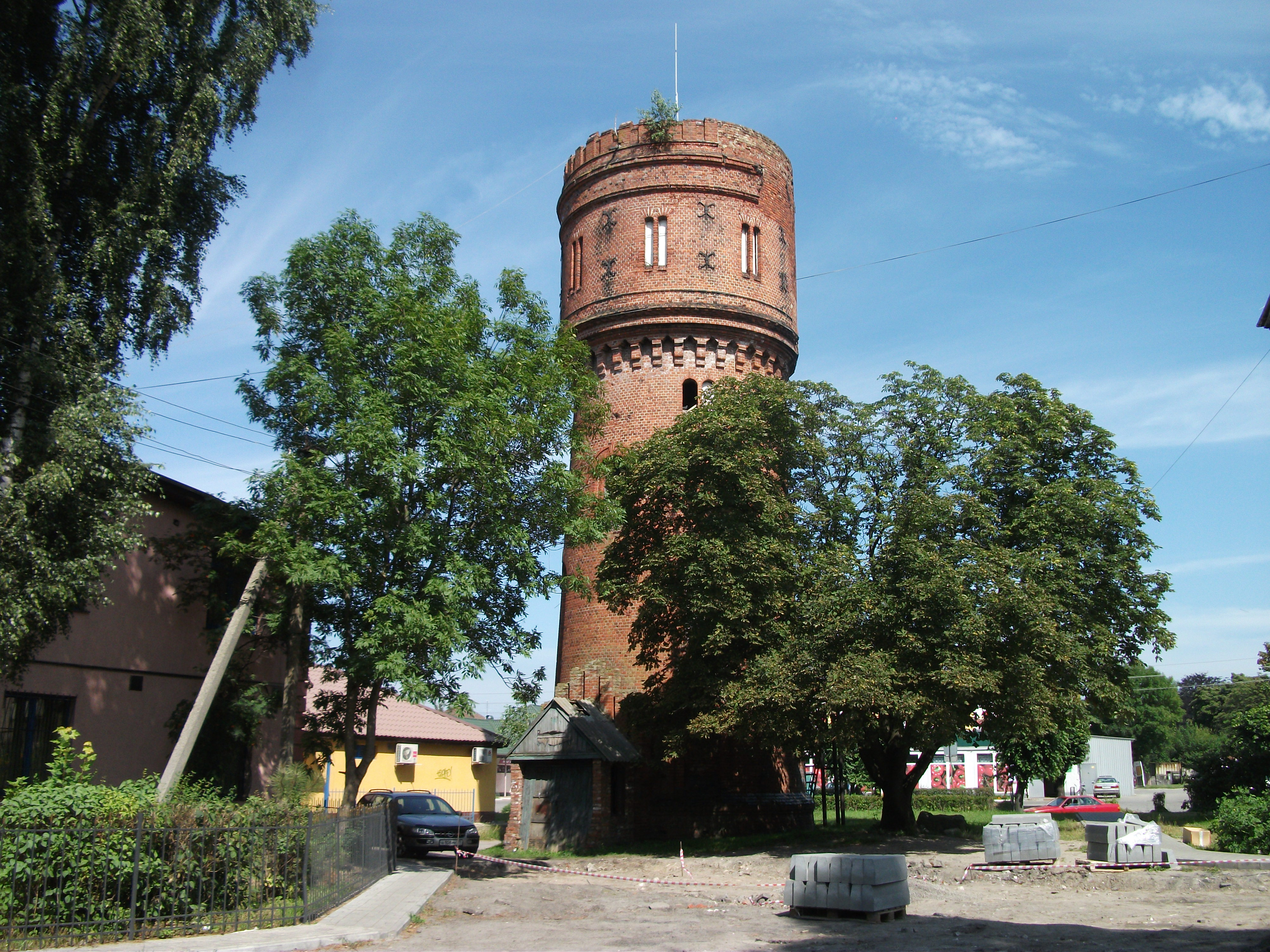 Водонапорная башня (Калиниградская область, Мамоново, город Мамоново)